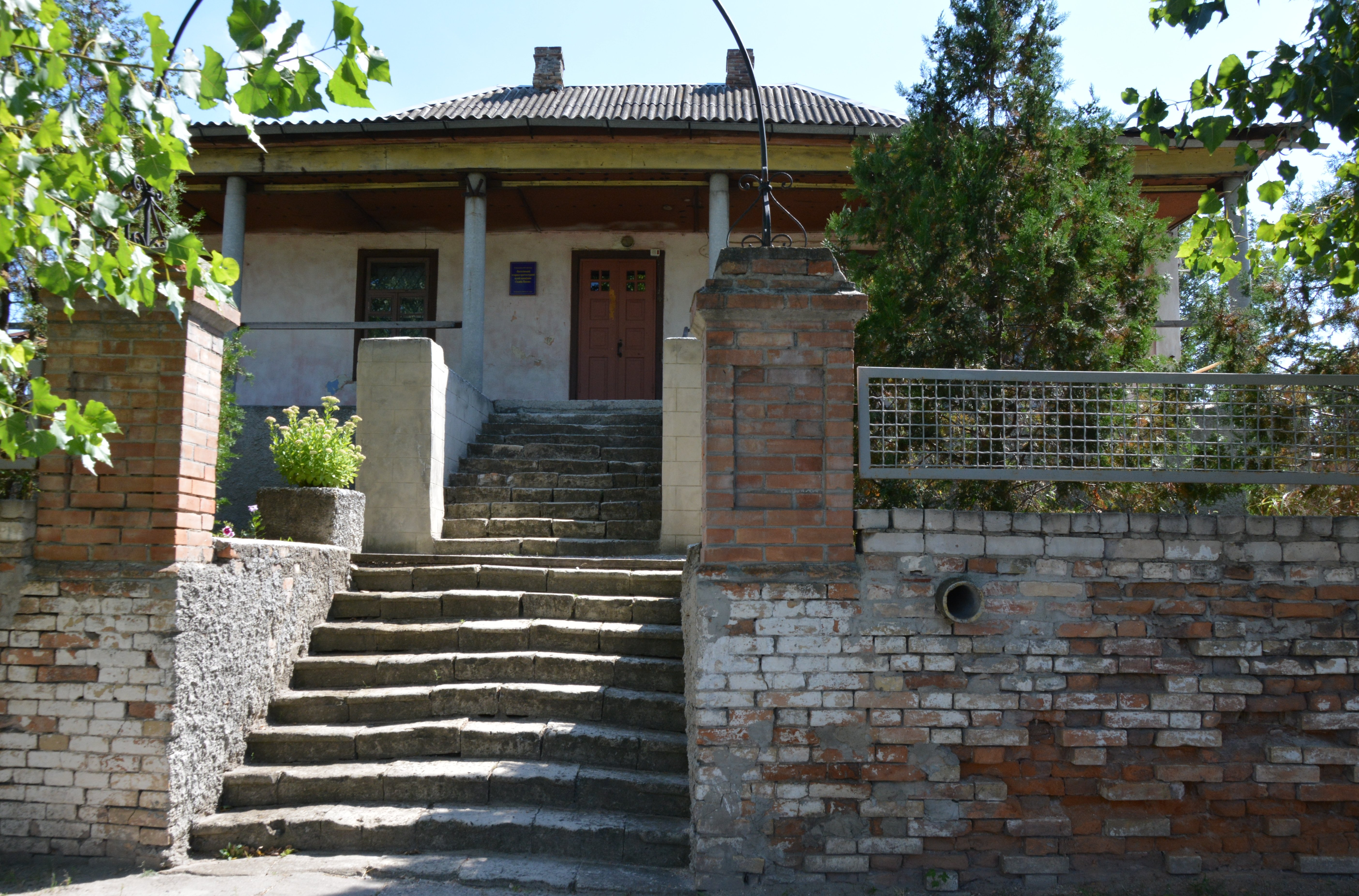 Садиба поміщика, Василівка, пров. Дружби, 2